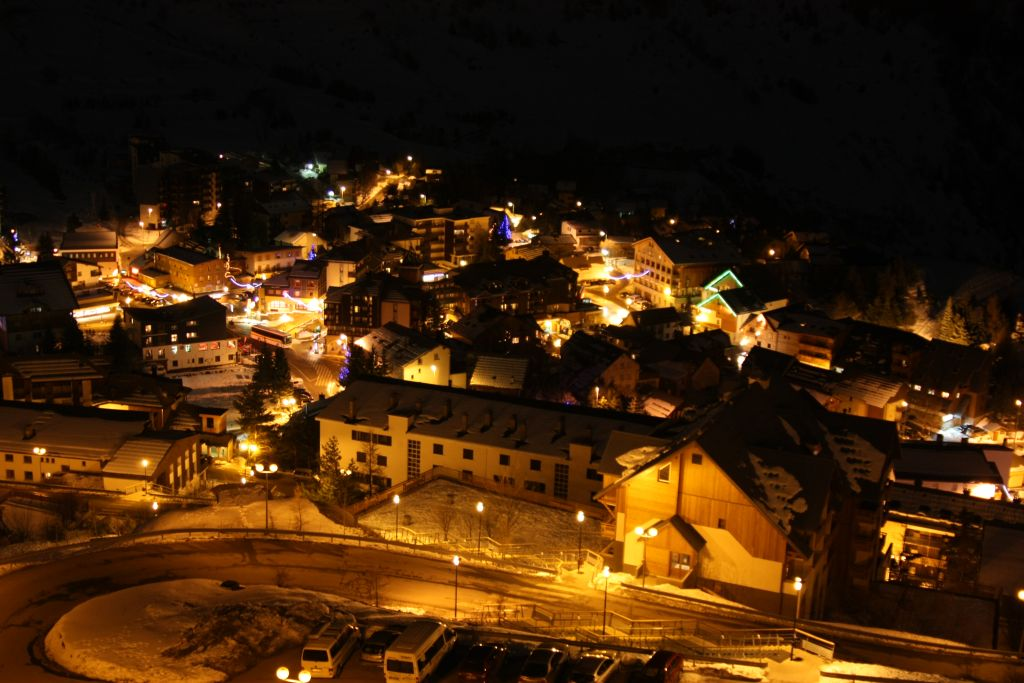 Noční pohled na městečko